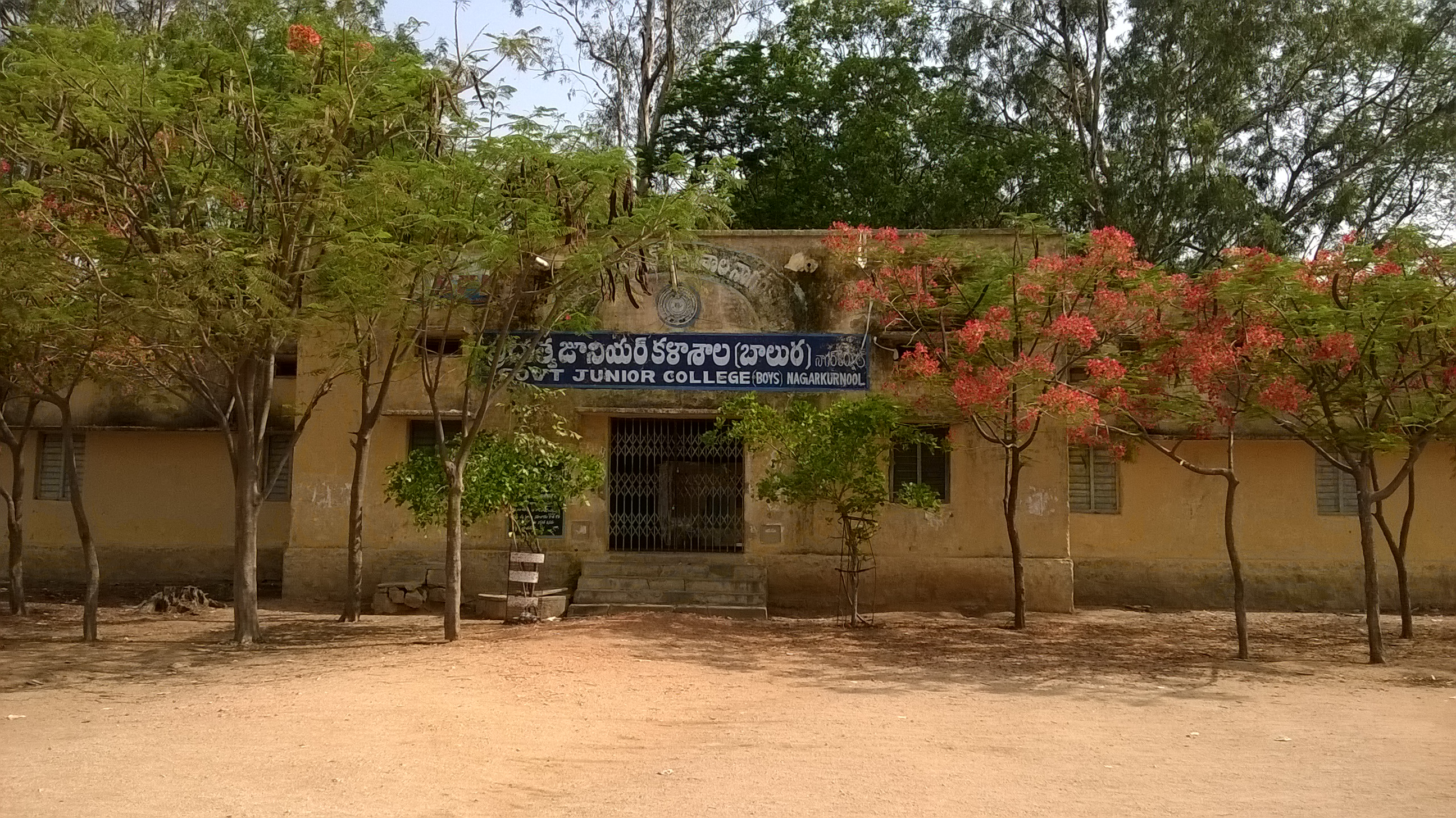 ప్రభుత్వ జూనియర్ కళాశాల(బాలురు), నాగర్‌కర్నూలు